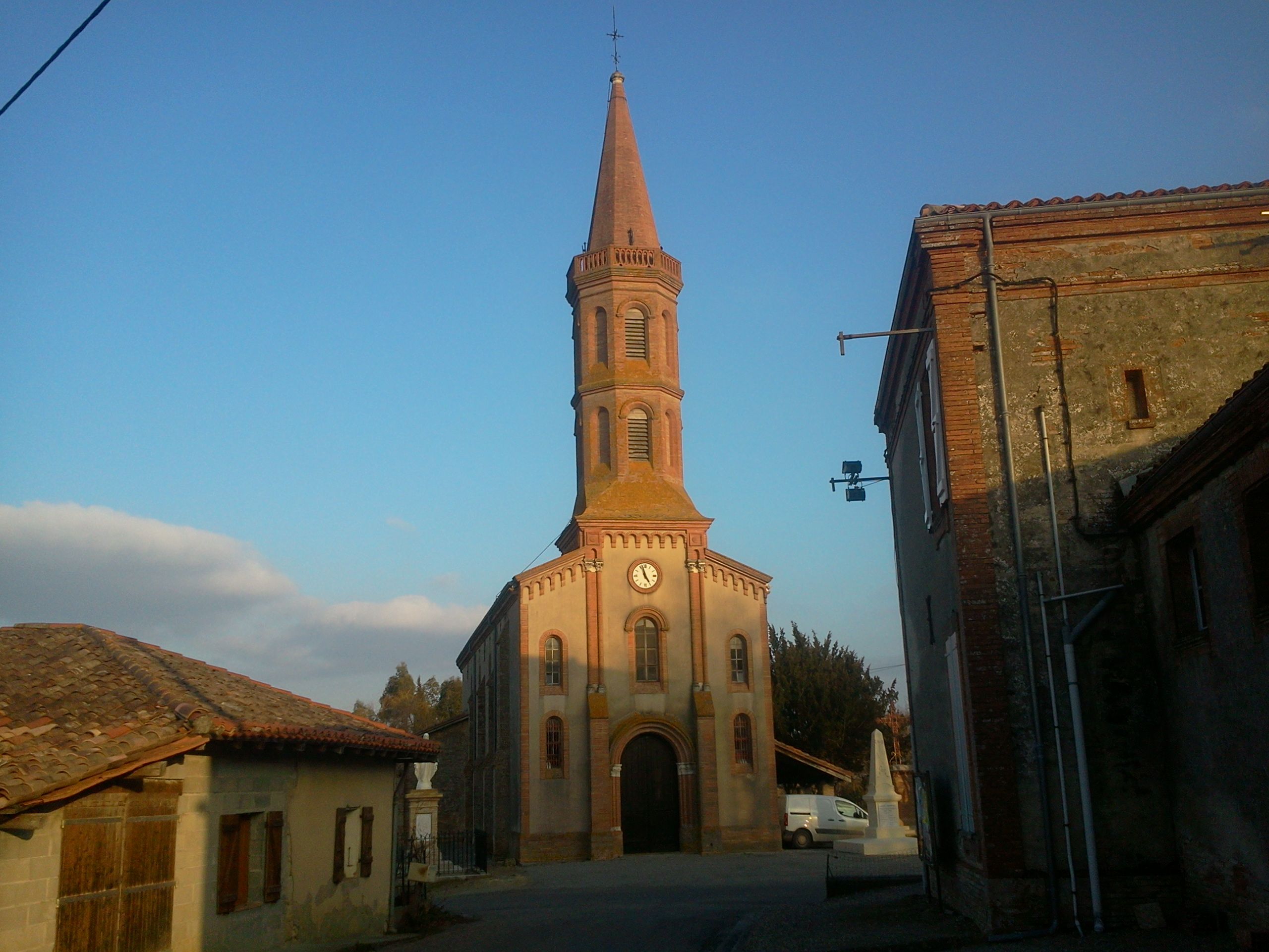 Eglise de Cabanac Séguenville